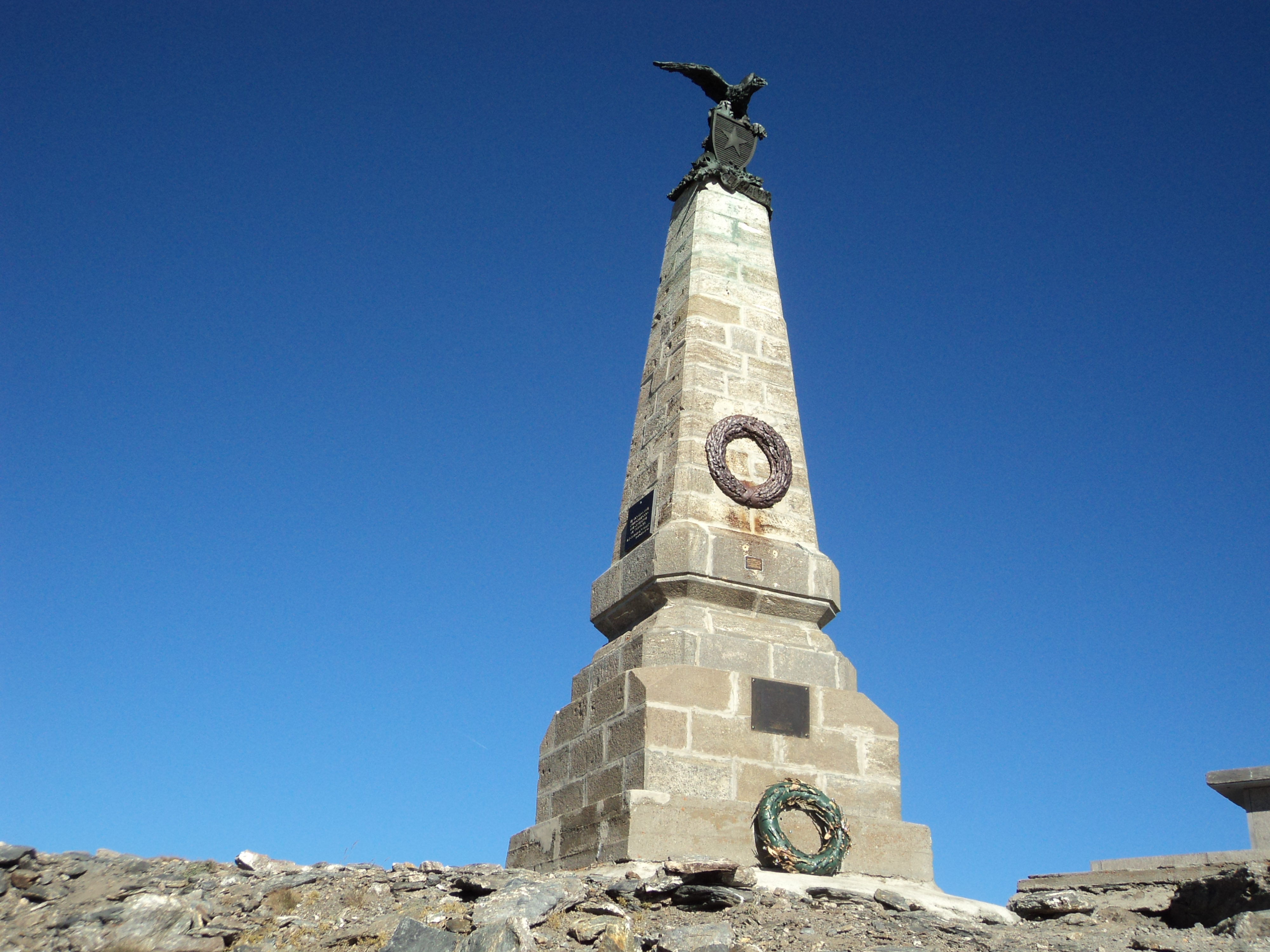 Vetta della Testa dell'Assietta. Alpi Cozie. Provincia di Torino